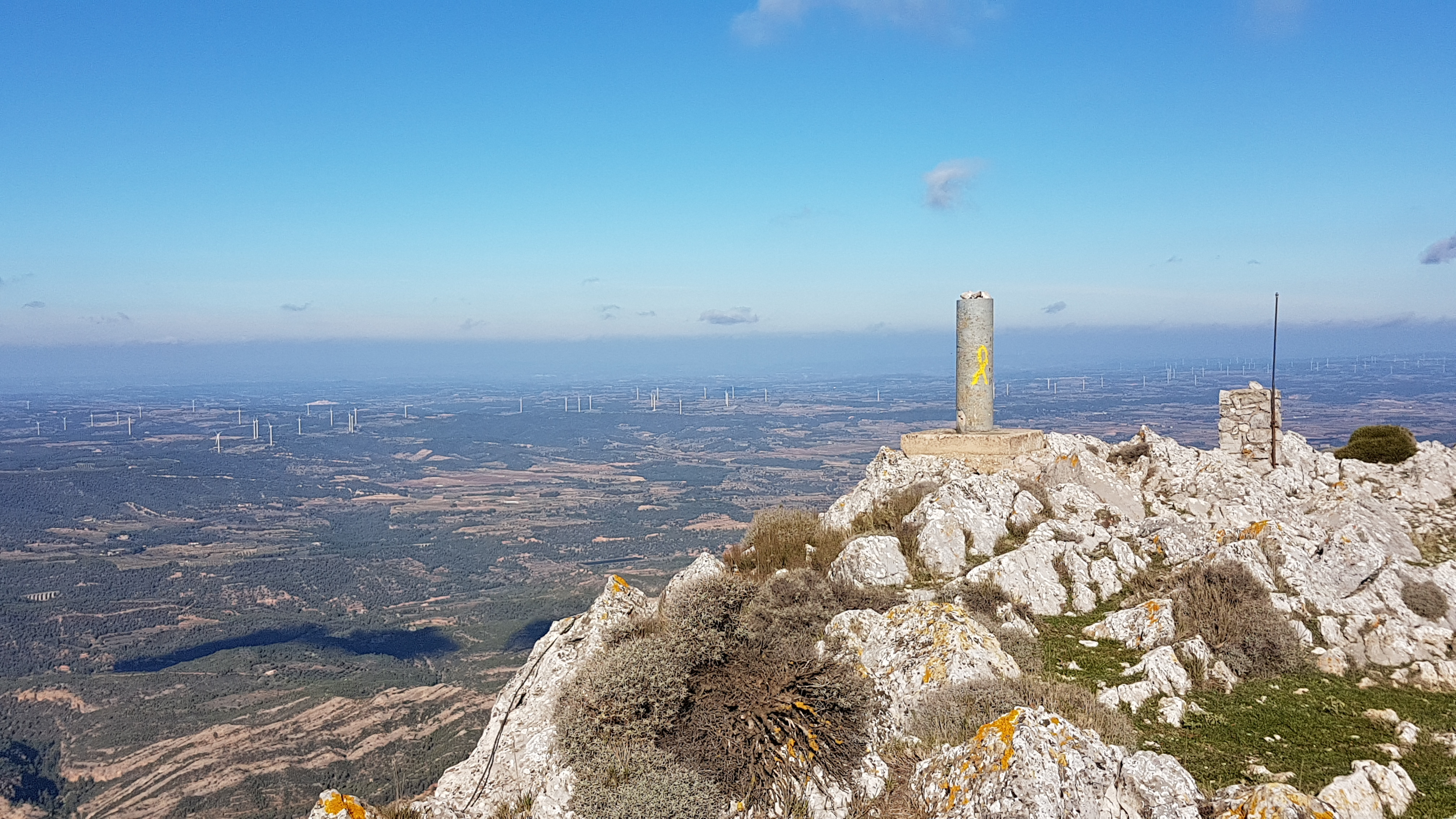 Aspecte del cim culminal de l'Engrilló